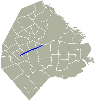 Avenida Gaona, Buenos Aires